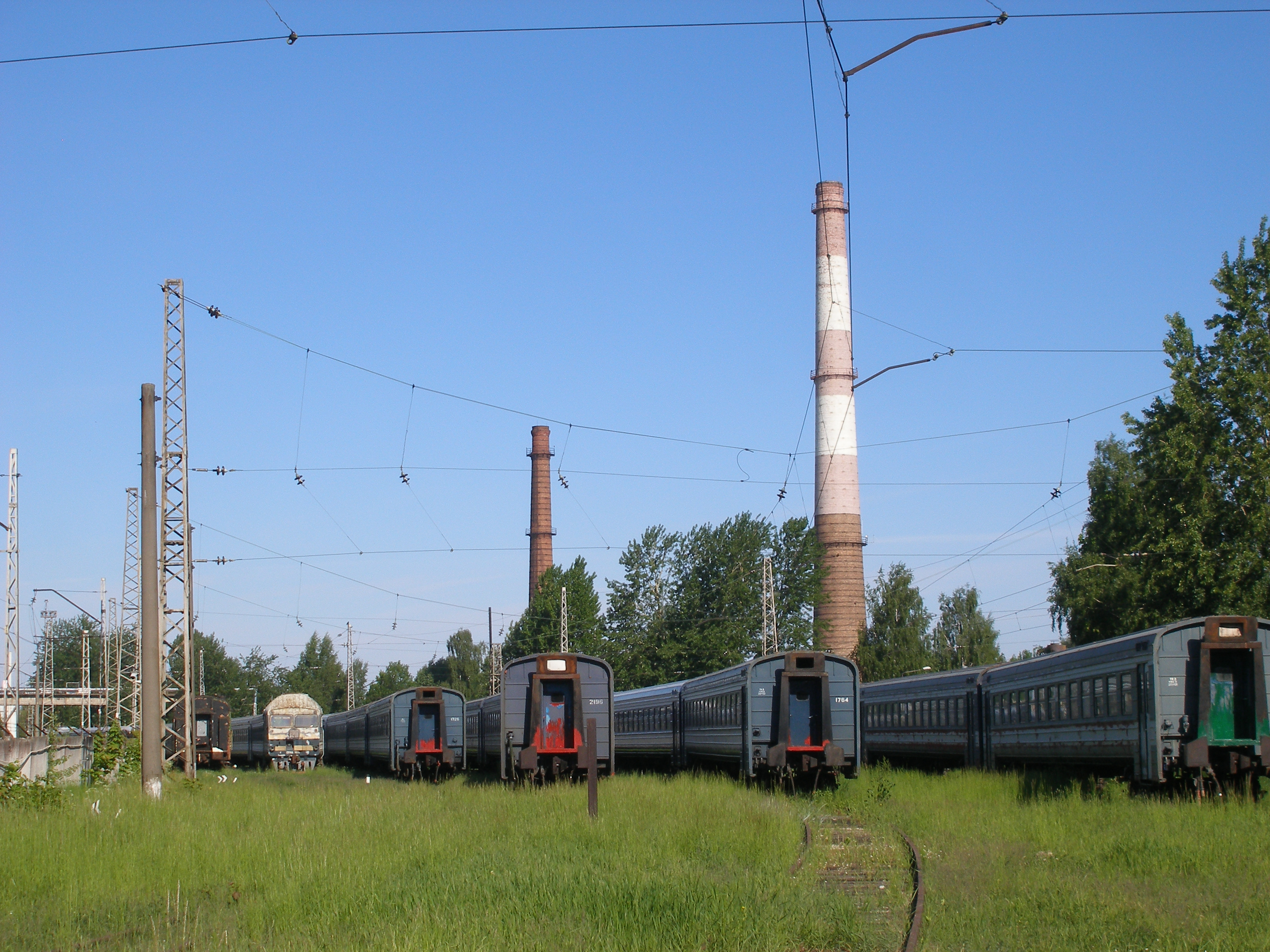 Vecie dīzeļvilcieni Zasulauka depo.